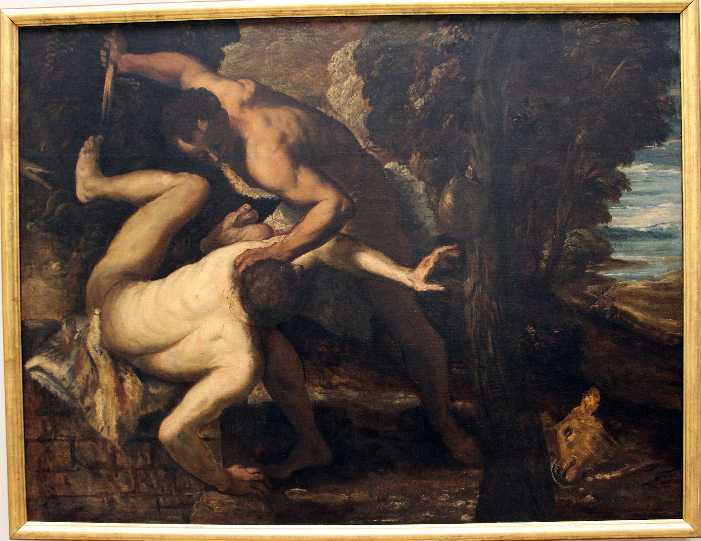 Gallerie dell'Accademia - MIBAC The making of this document was supported by Wikimedia CH. (Submit your project!) For all the files concerned, please see the category Supported by Wikimedia CH. This is a photo of a monument which is part of cultural heritage of Italy.